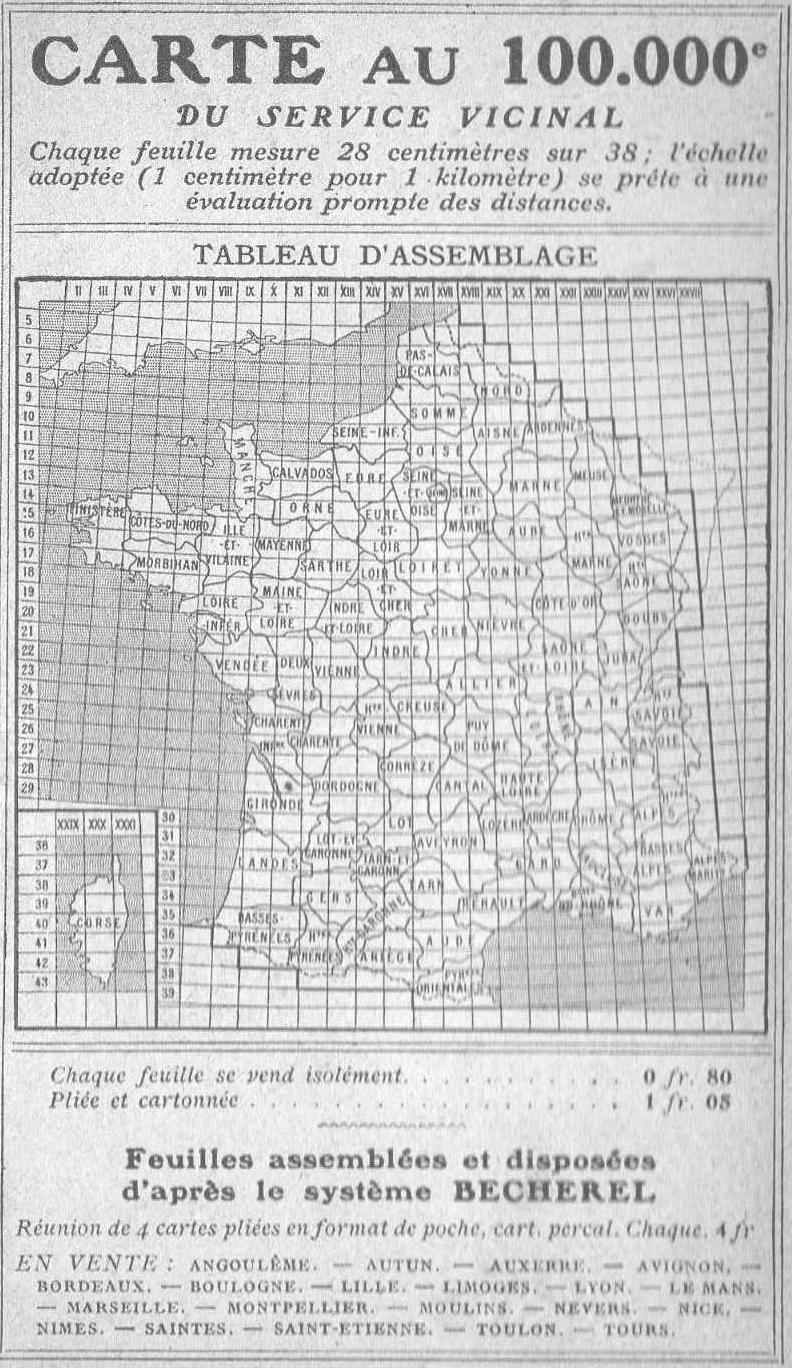 Tableau d'assemblage de la carte du service vicinale